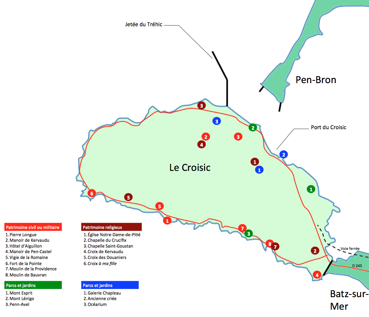 Localisation des principaux sites du patrimoine du Croisic.